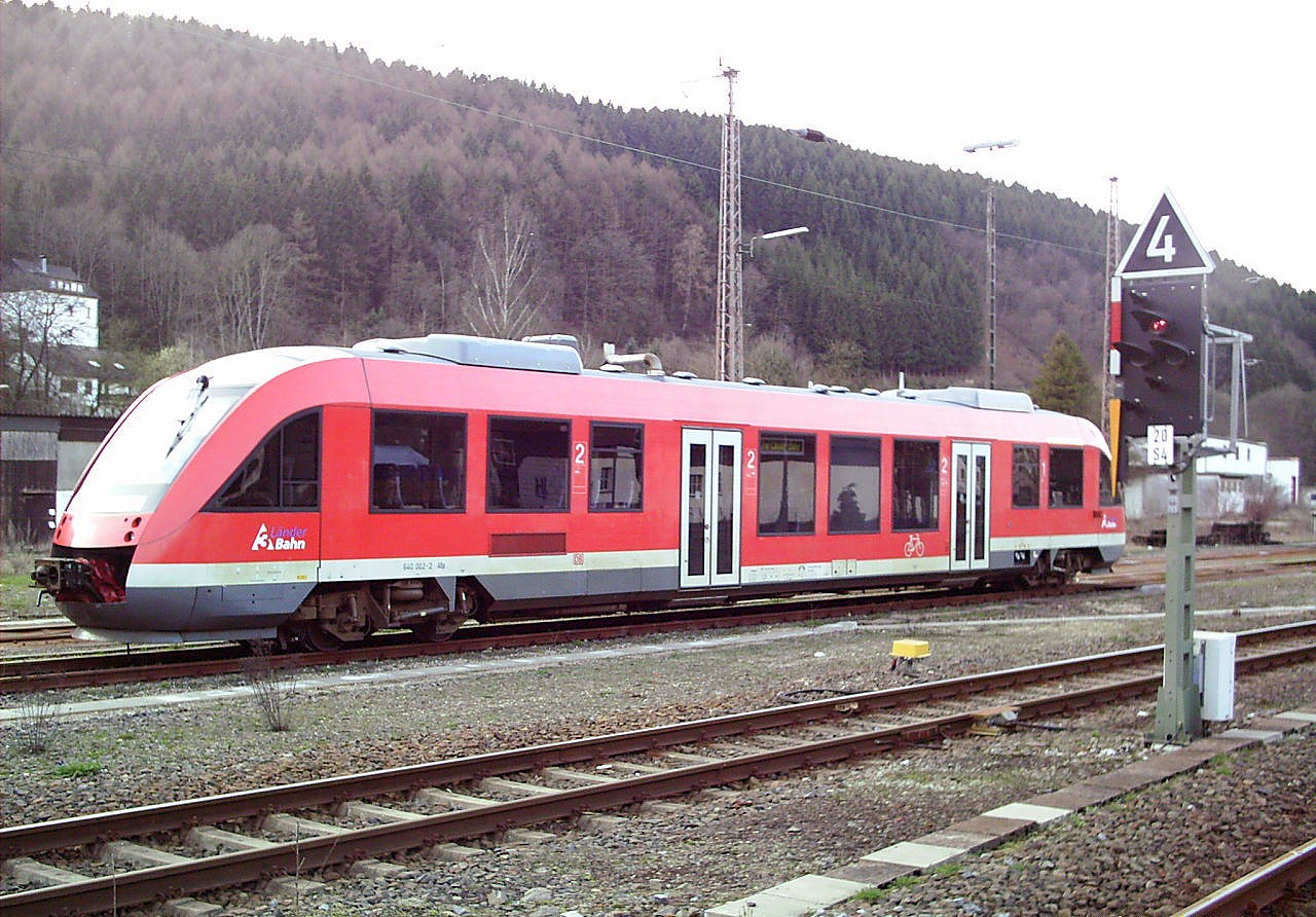 Triebfahrzeug der DreiLänderBahn in Finnentrop